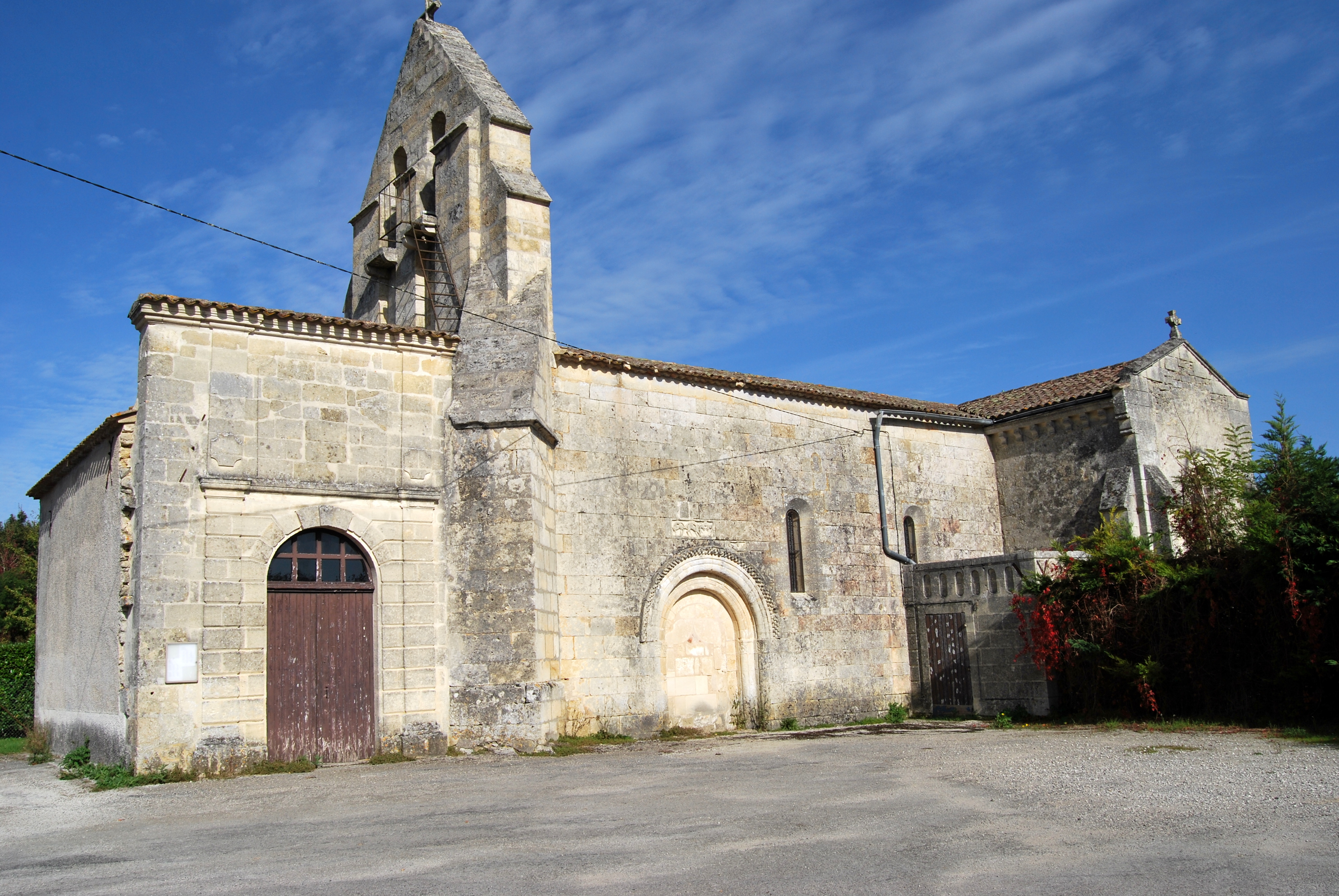 Église Saint-Martin de Camiac-et-Saint-Denis